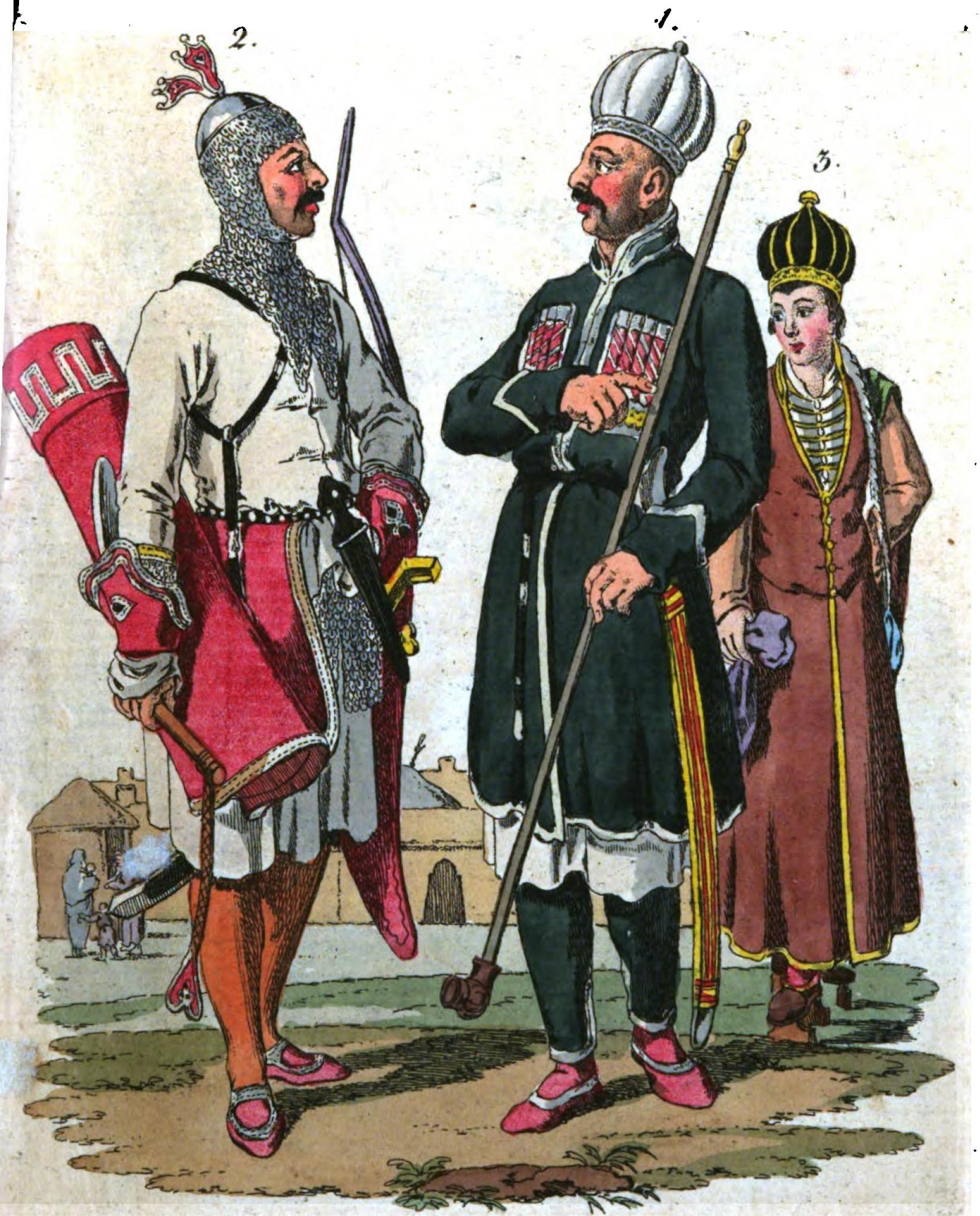 Caucasische Völker: 1. Vornehmer Tscherkess in gewöhnl. Kleidung. 2. Gewappneter Tscherkess. 3. Tscherkessische Fürstentochter.